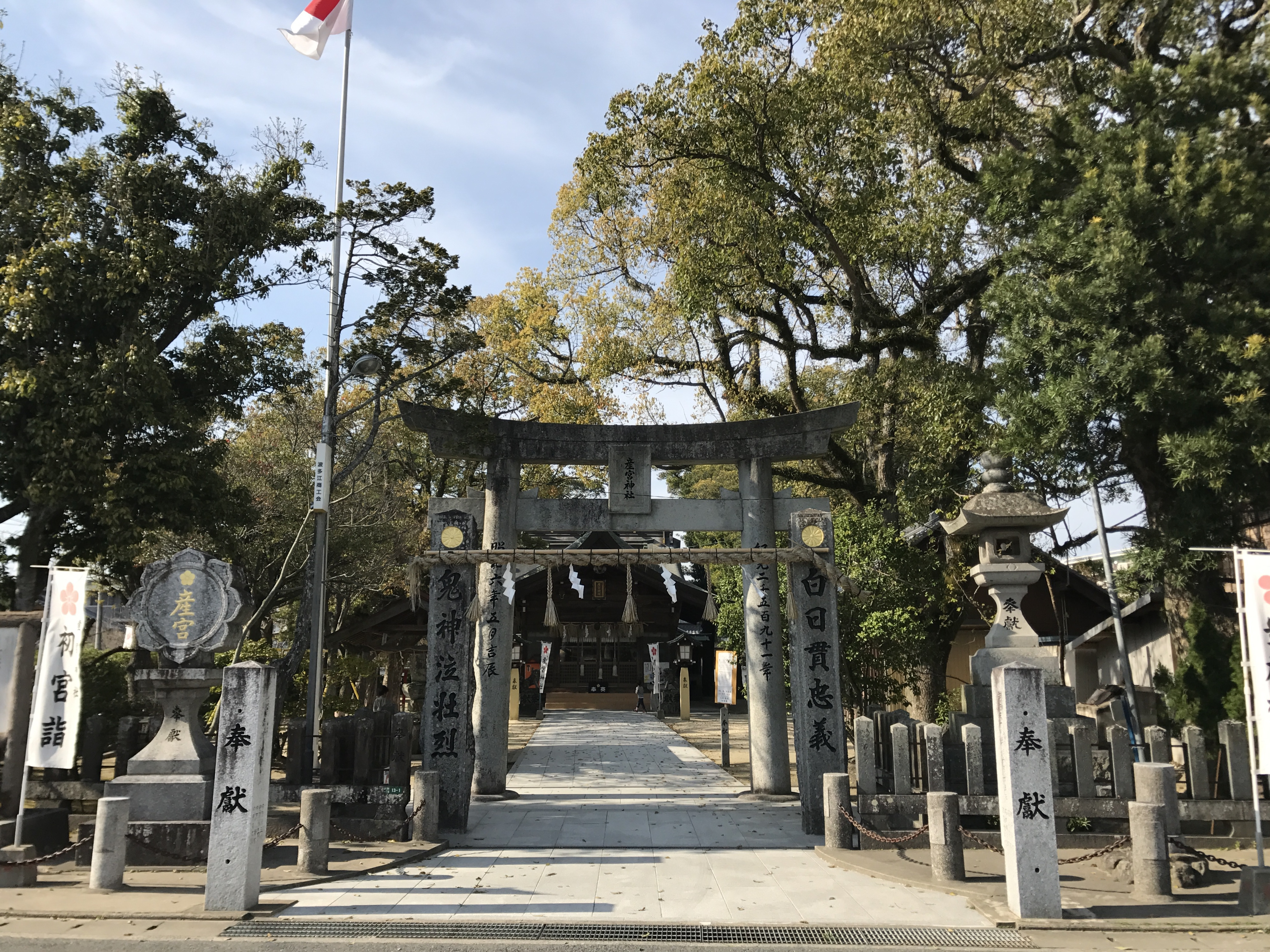 産宮神社の鳥居